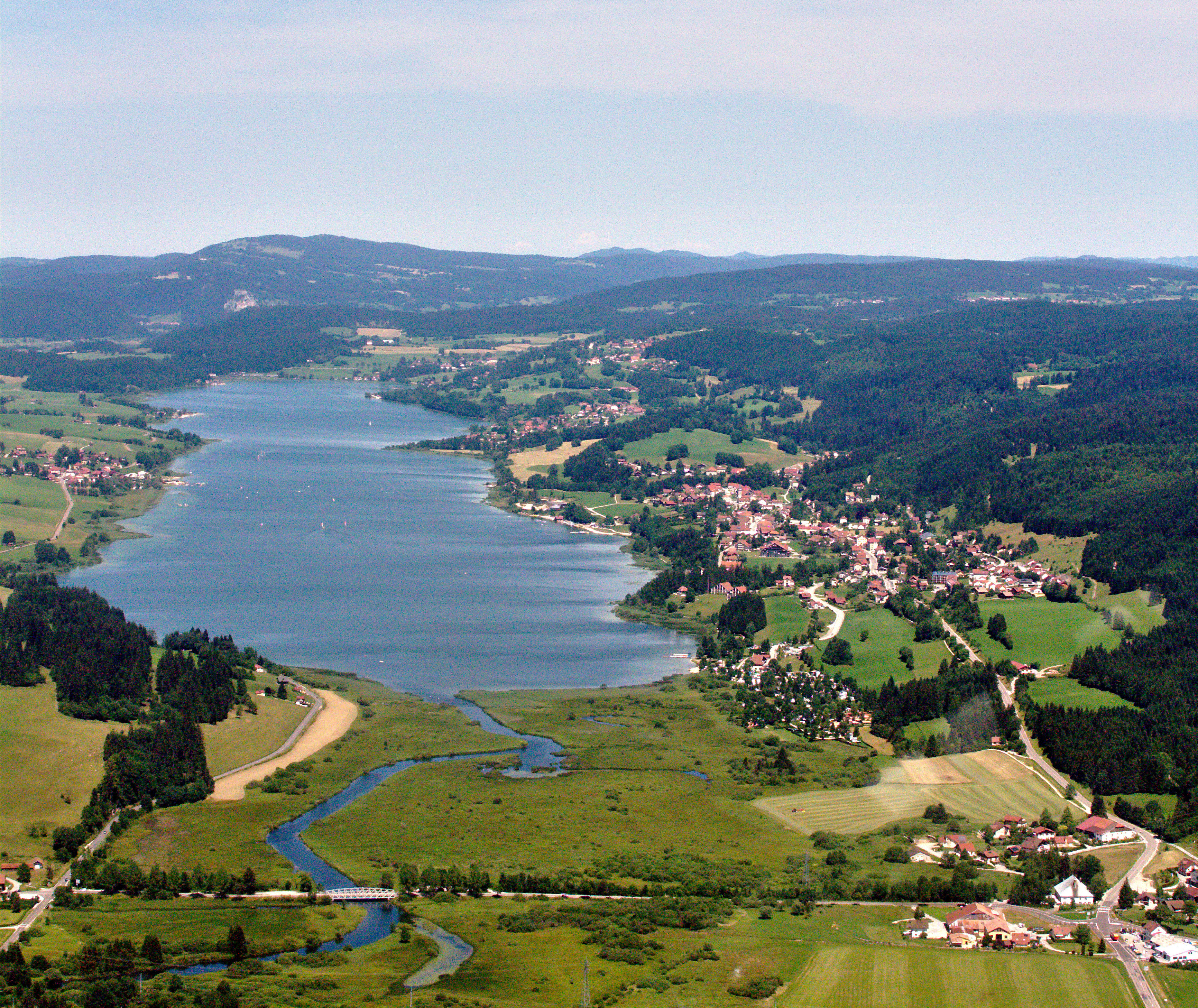 Vue aérienne du Lac de Saint-Point